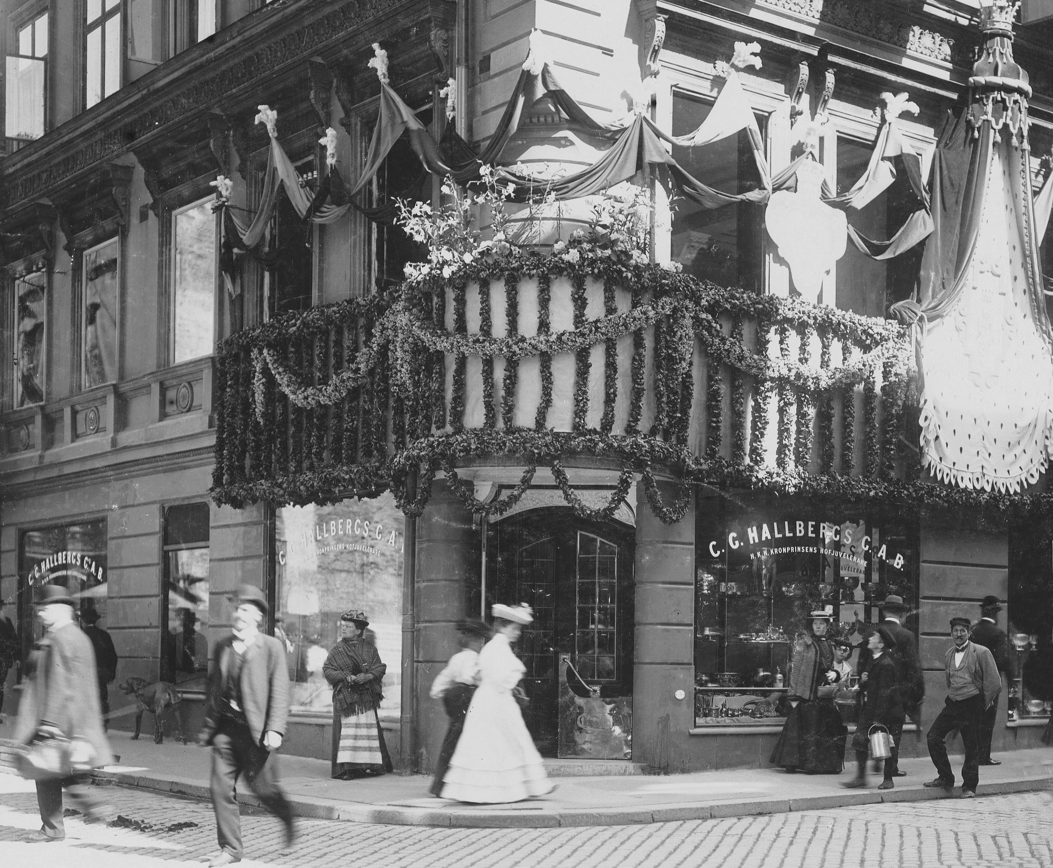 Fredsgatan - Drottninggatan med Hallbergs guldsmedsaffär